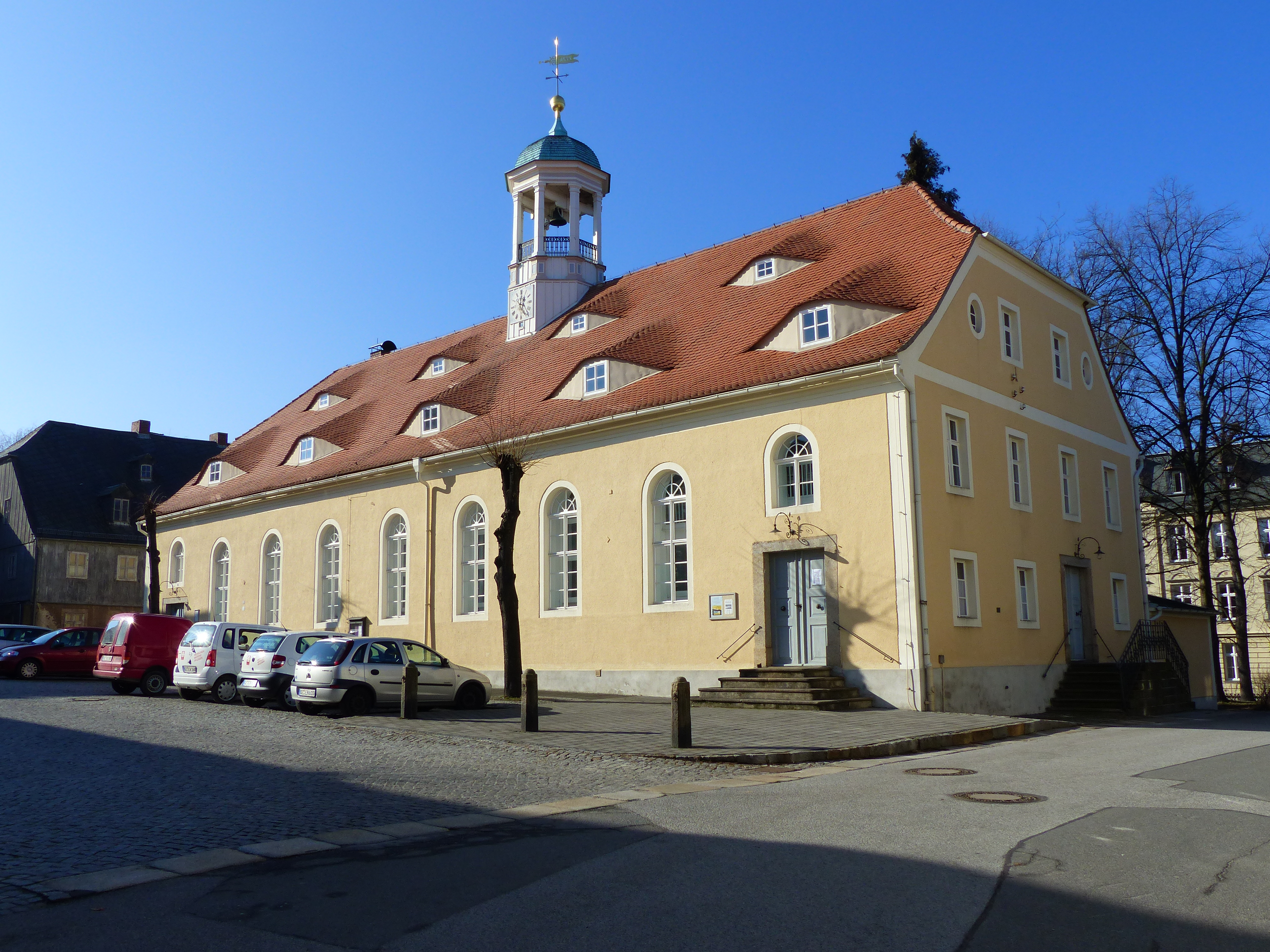 Denkmalgeschütztes Gebäude, Zinzendorfplatz 8, Kleinwelka bei Bautzen